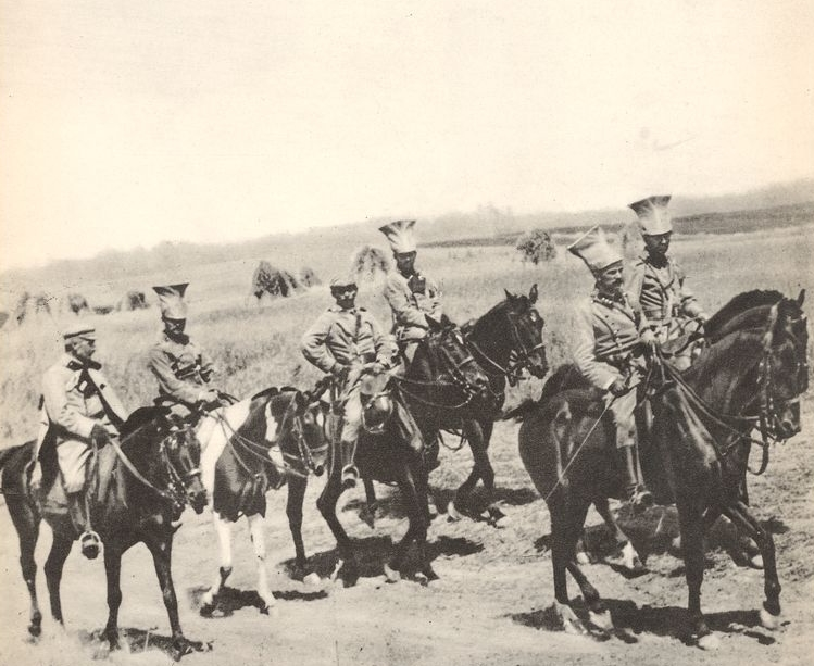 Rtm. Władysław Belina-Prażmowski ze swoim sztabem. Na czapkach widoczne ceratowe pokrowce.